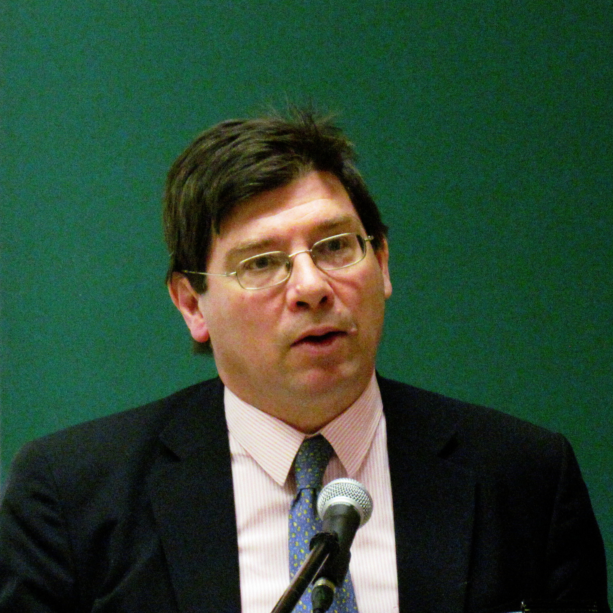 Pr François Crépeau, rapporteur spécial des Nations unies sur les droits de l'homme des migrants